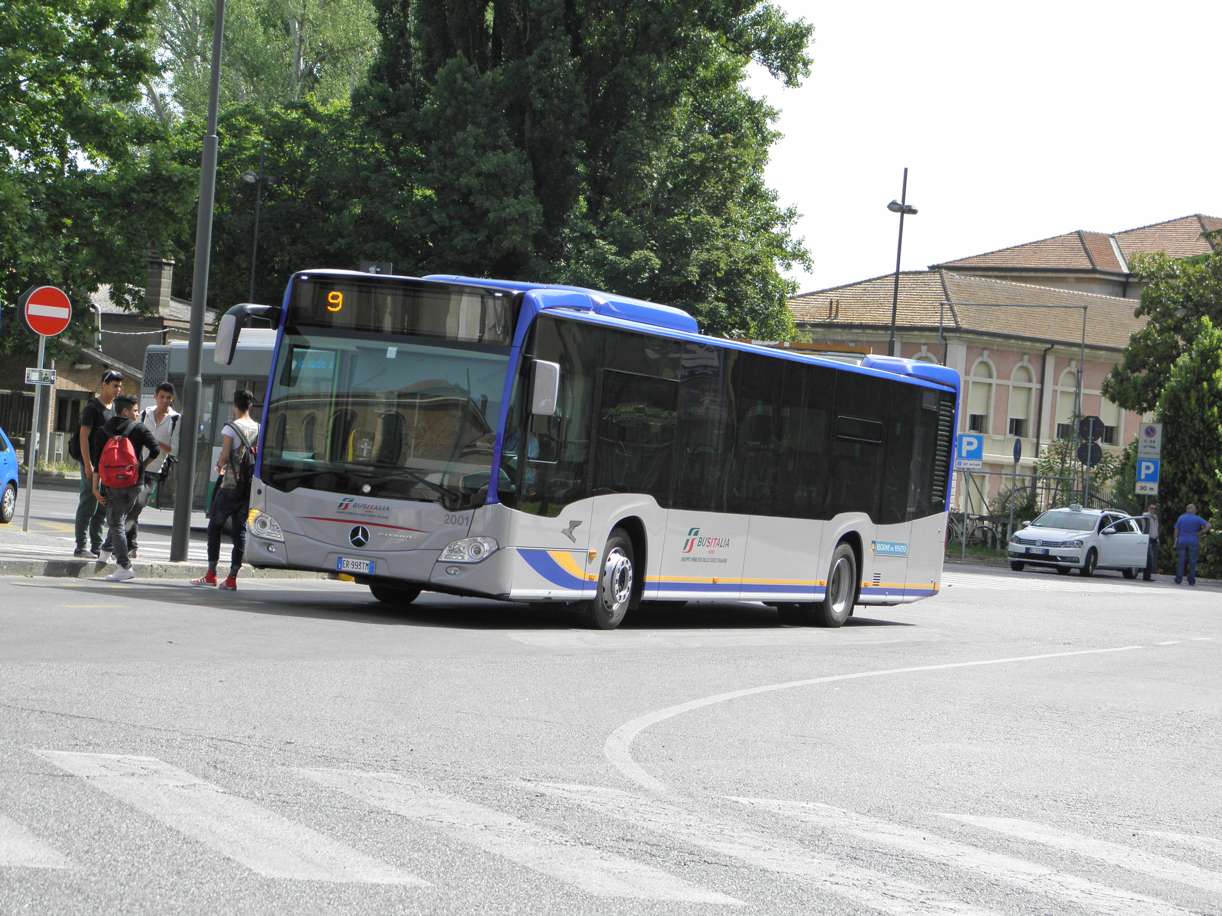 Rovigo, uno dei Mercedes-Benz Citaro nella nuova livrea Busitalia-Sita Nord fotografato in una delle due fermate della stazione ferroviaria.